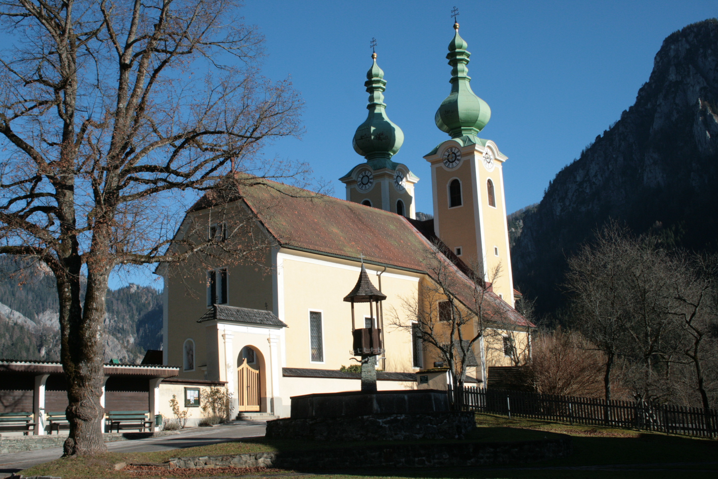 Kirchhofanlage hl. Antonius von Padua und Friedhof